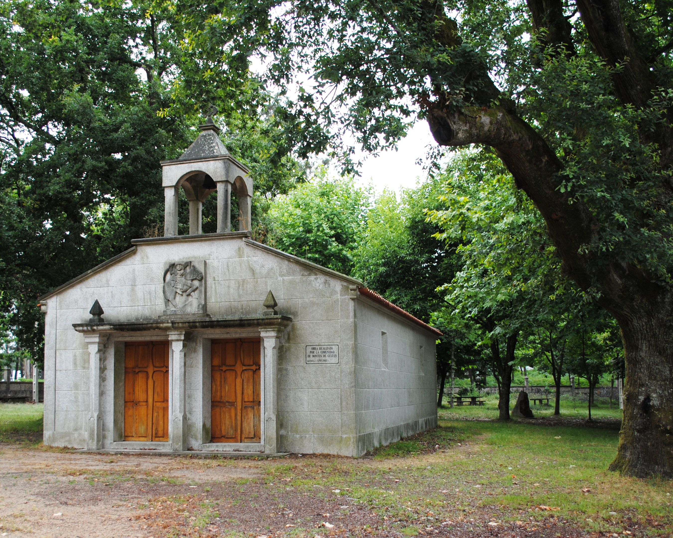 Capela de Santiago de Antas en Guizán, Mos.